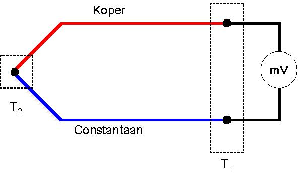 Thermokoppel - eigen werk - publiek domein